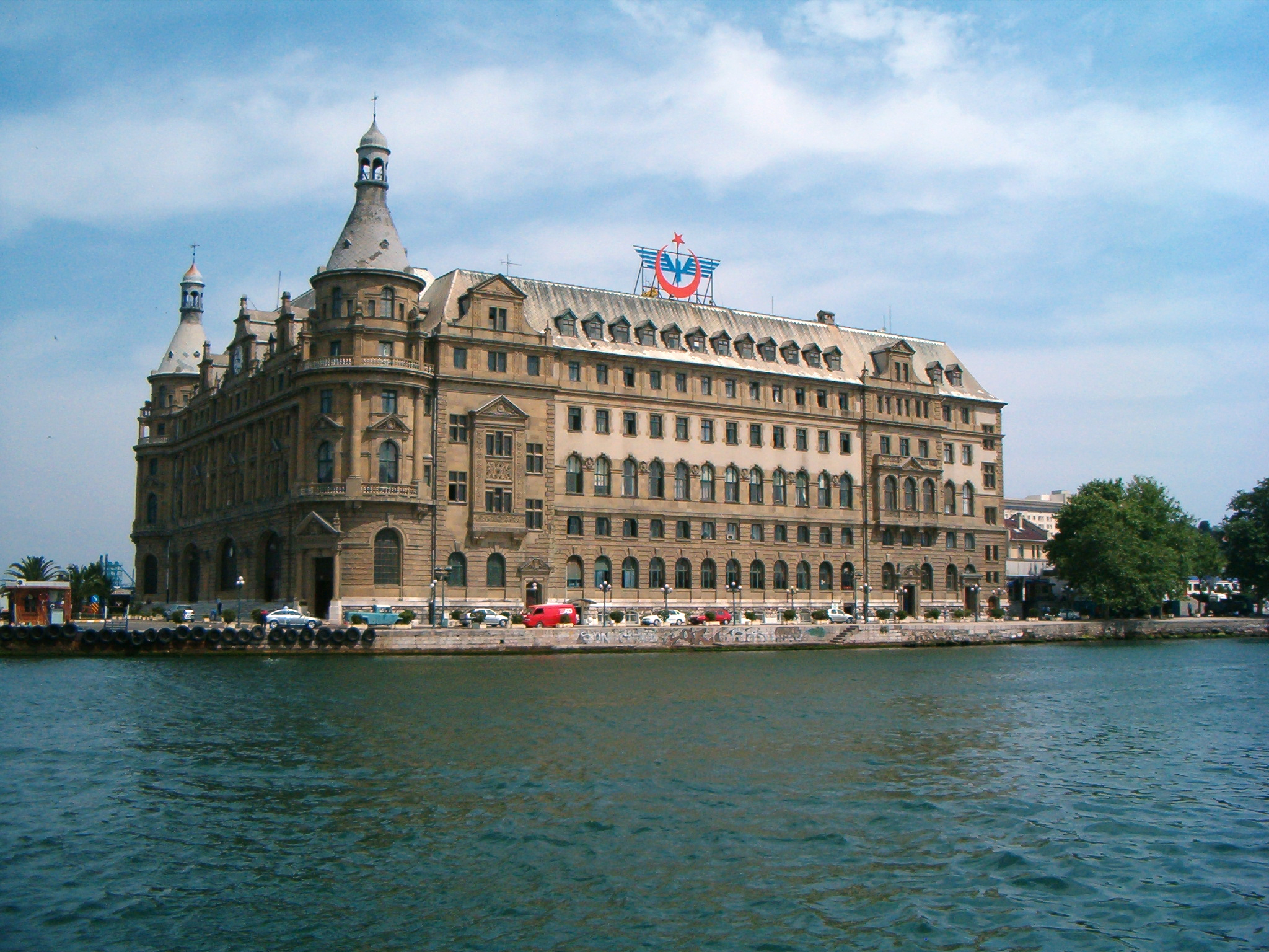 Haydarpasa train station